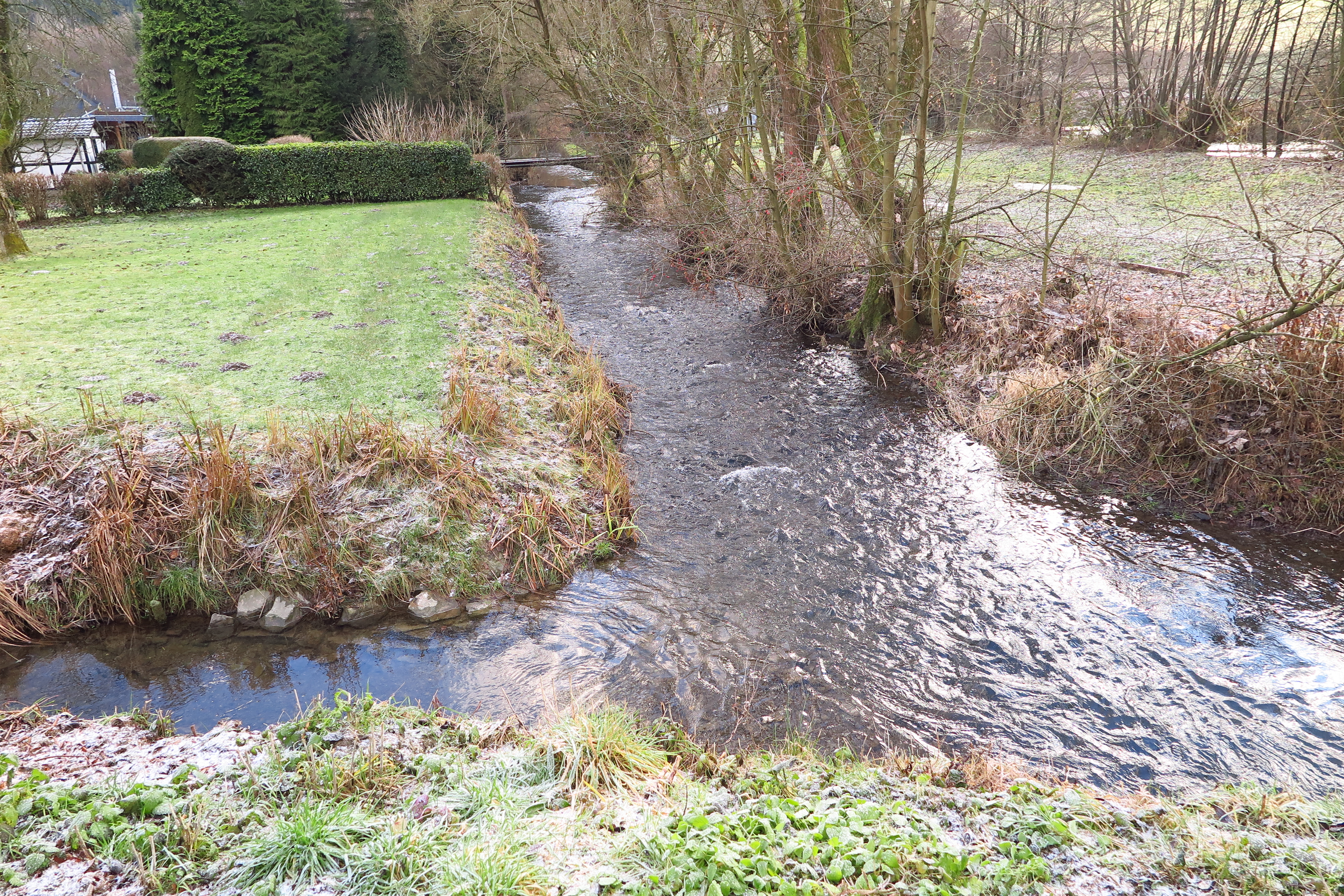 Lindlarer Sülz bei Hartegasse; Mündung des Breunbachs (Vordergrund) in die Lindlarer Sülz